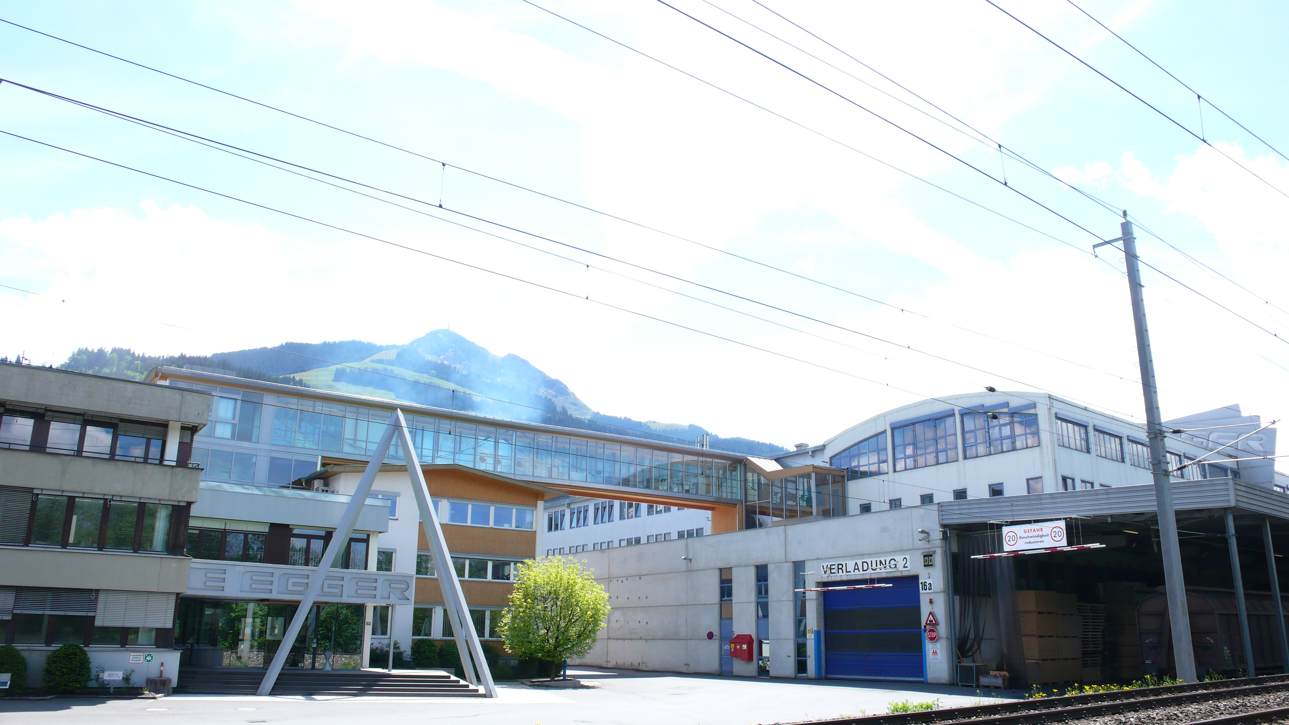 Fritz Egger GmbH & Co St. Johann in Tirol. Im Hintergrund das Kitzbüheler Horn.